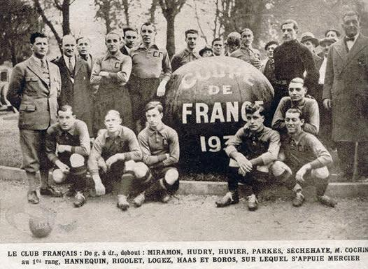 Équipe du Club français, vainqueur de la Coupe de France de football 1930-1931.